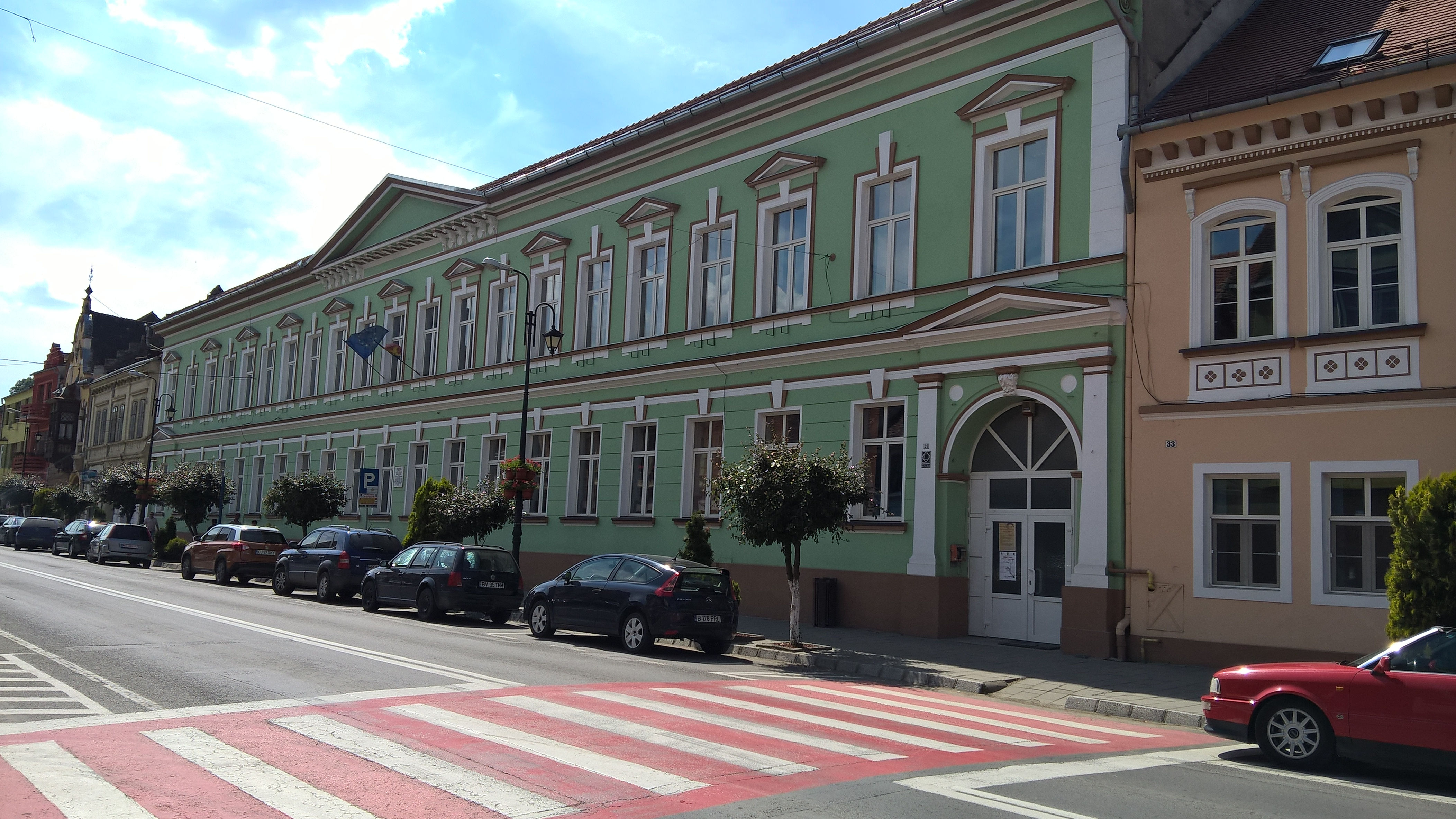 Liceul „Mircea Eliade”